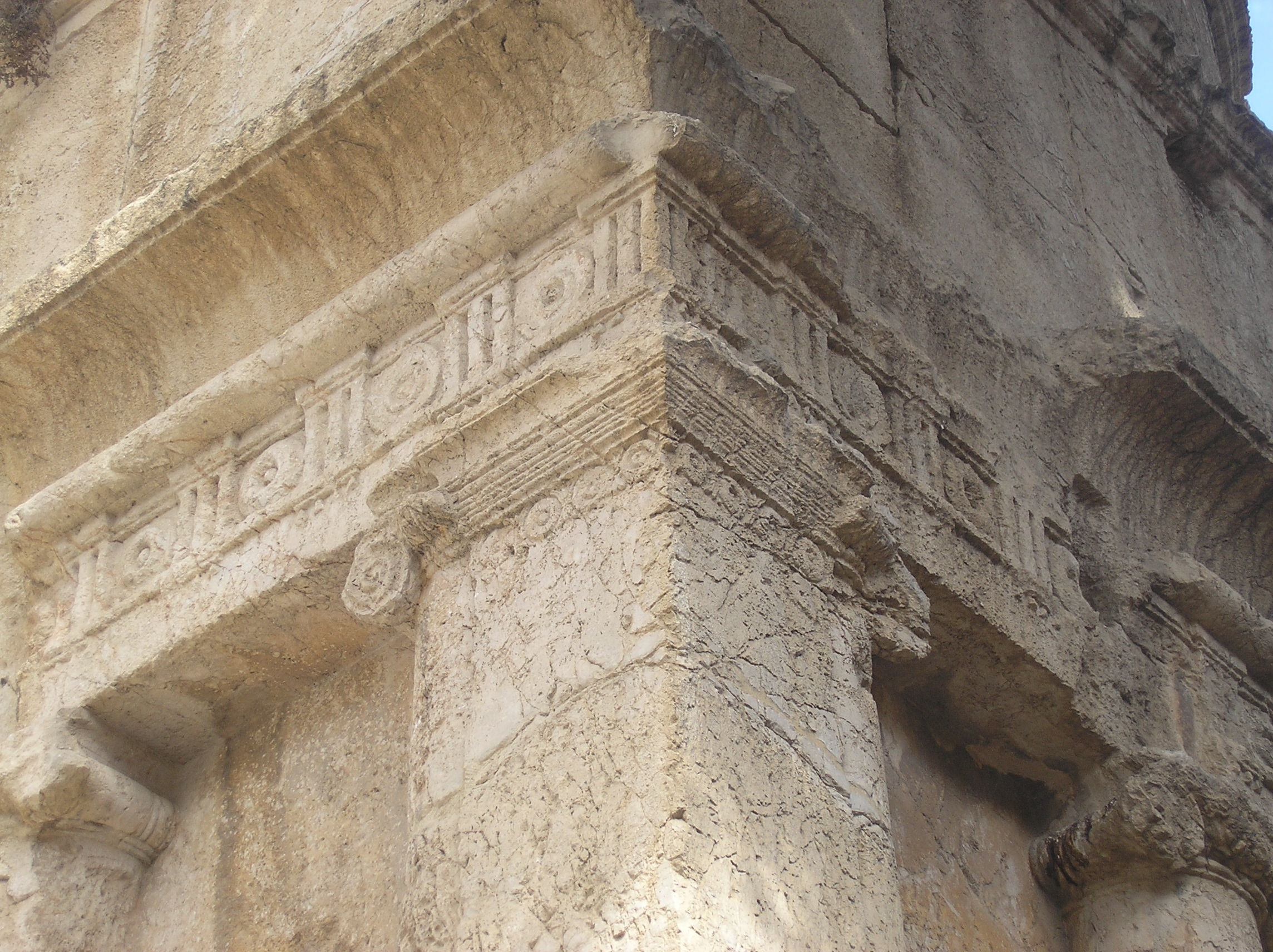 Yad Avshalom